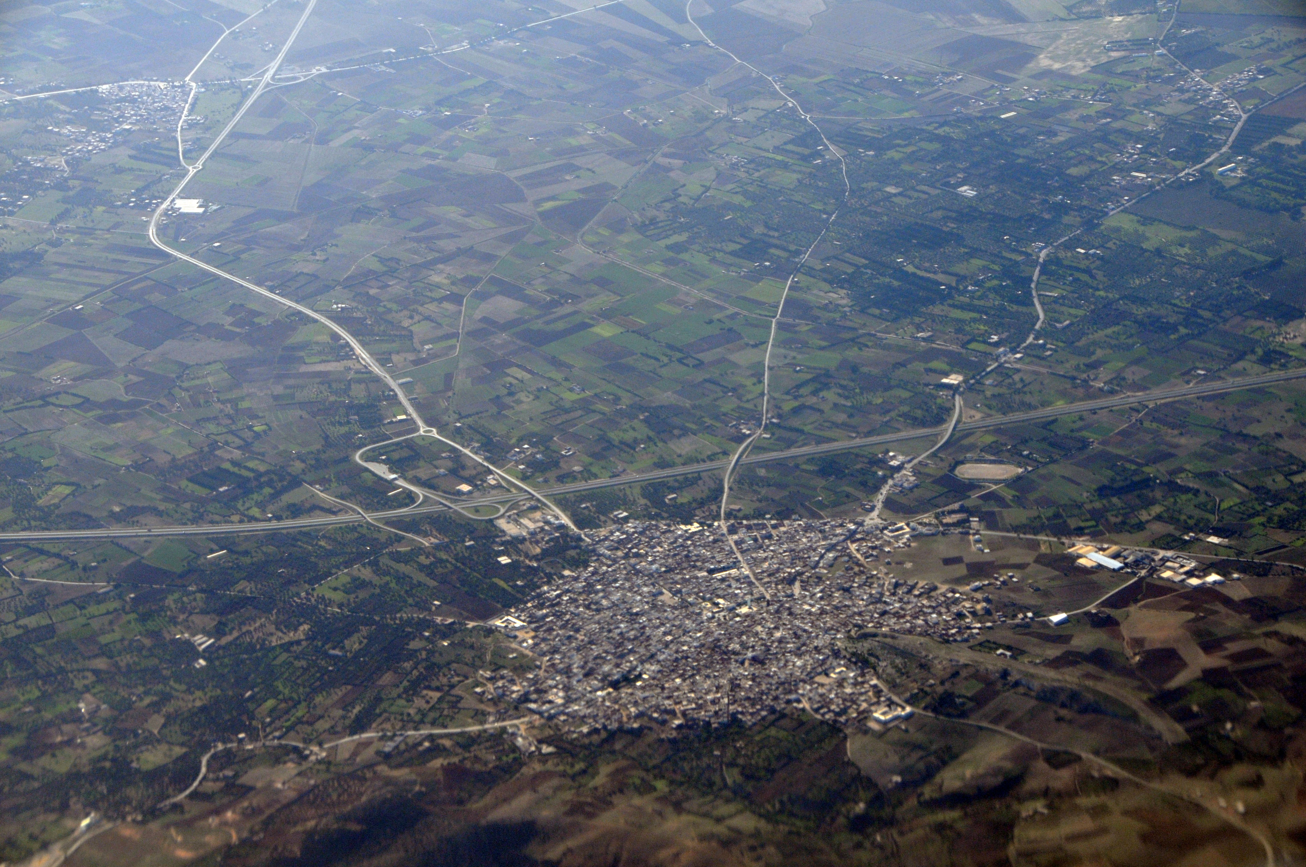 Ville d'El Alia et l'autoroute A4 (Tunis-Bizerte), Tunisie.